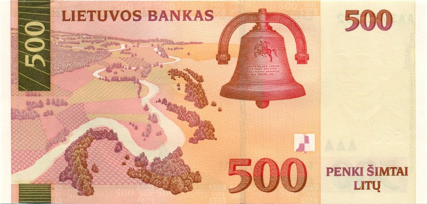 Lithuania 500 litu 2000